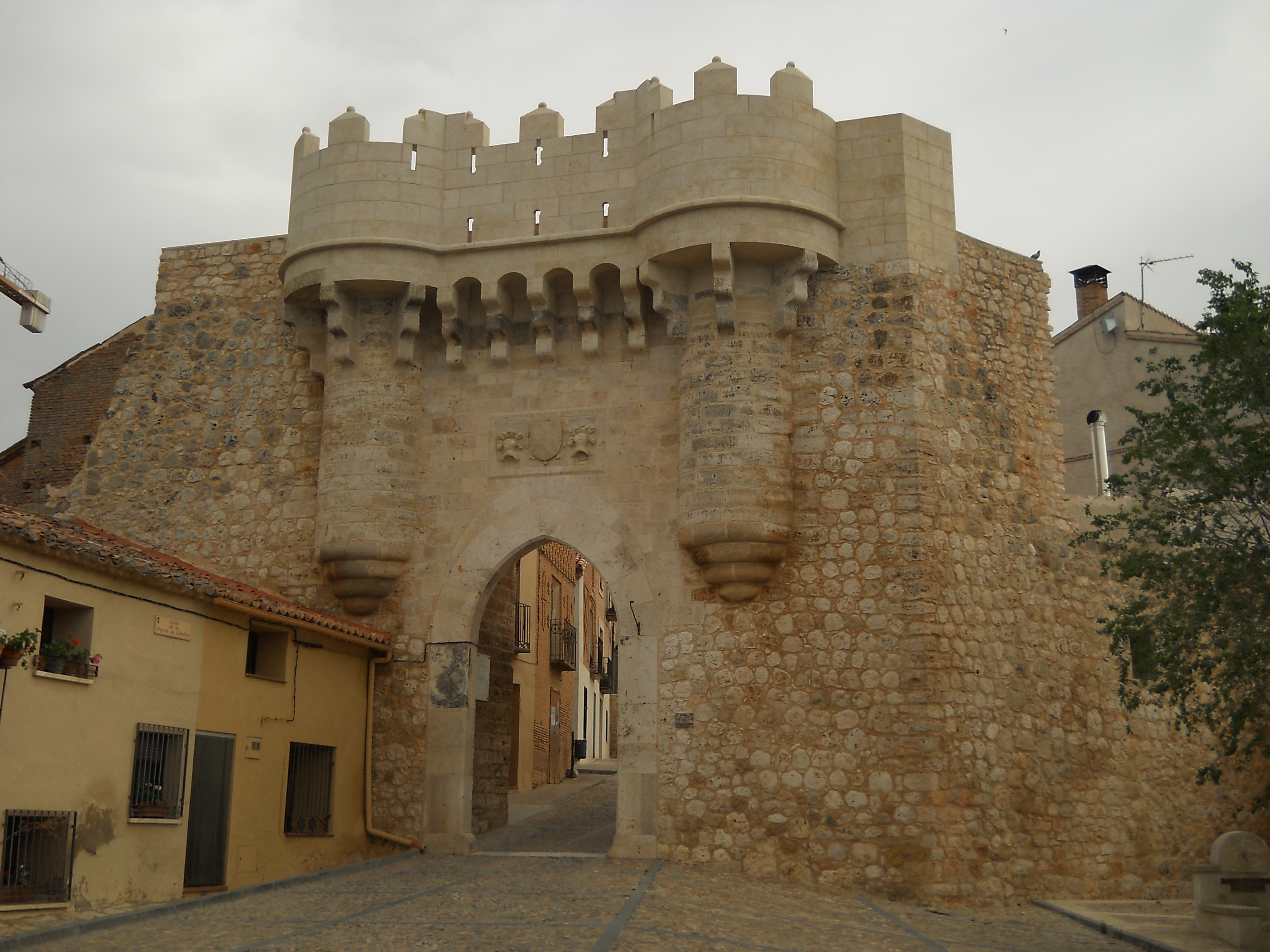 Puerta de Santa María, Hita, Guadalajara, España